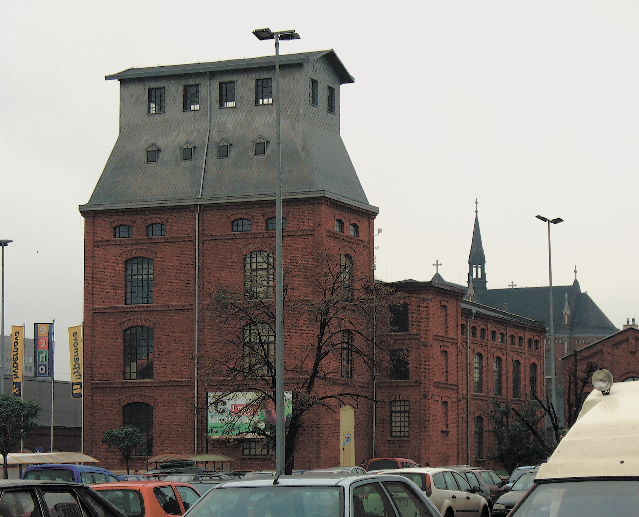 Pozostałości po fabryce Kindelra